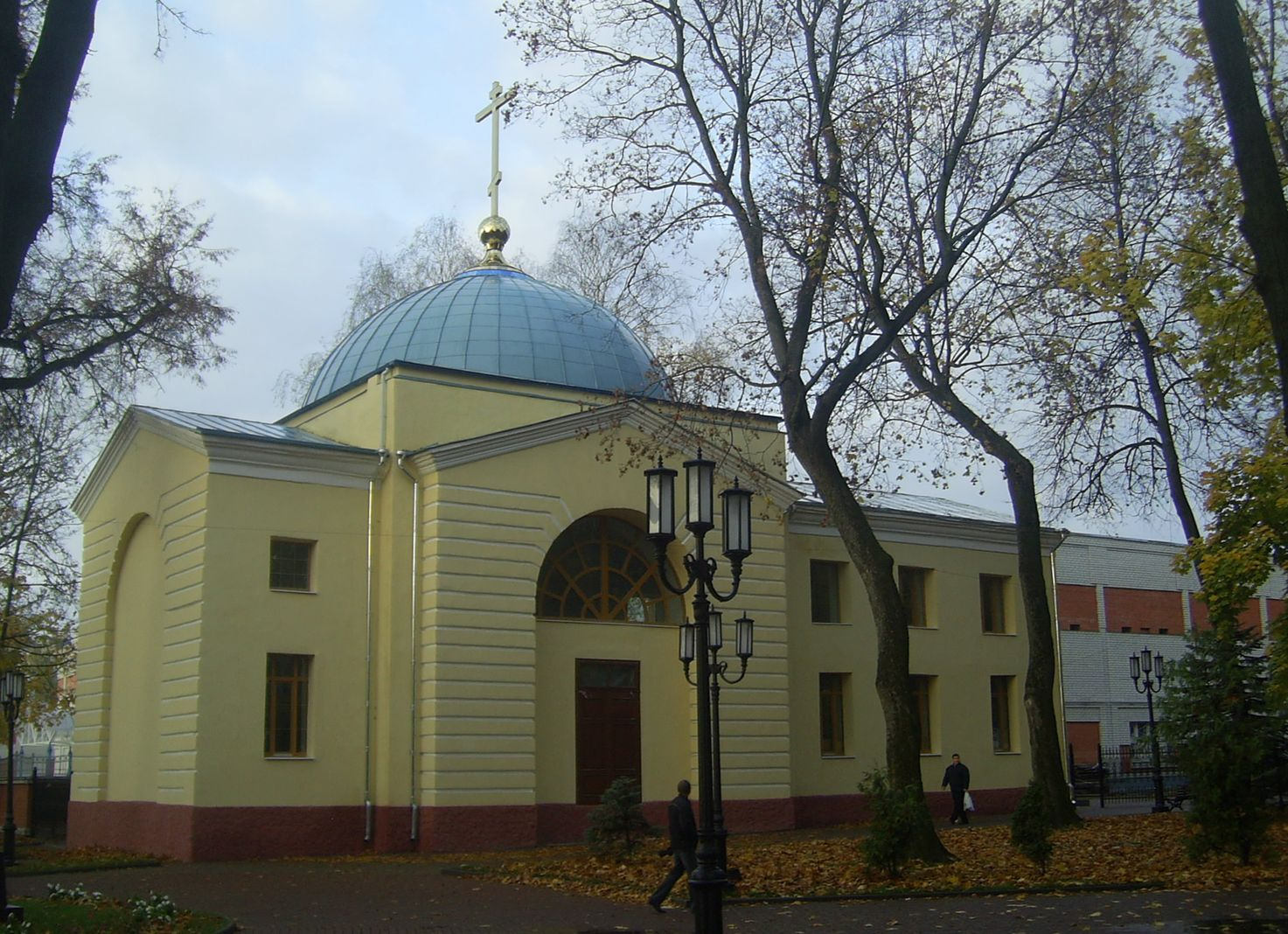 Парк-музей им. А.К.Толстого, Брянск. Вид на храм Рождества Богородицы